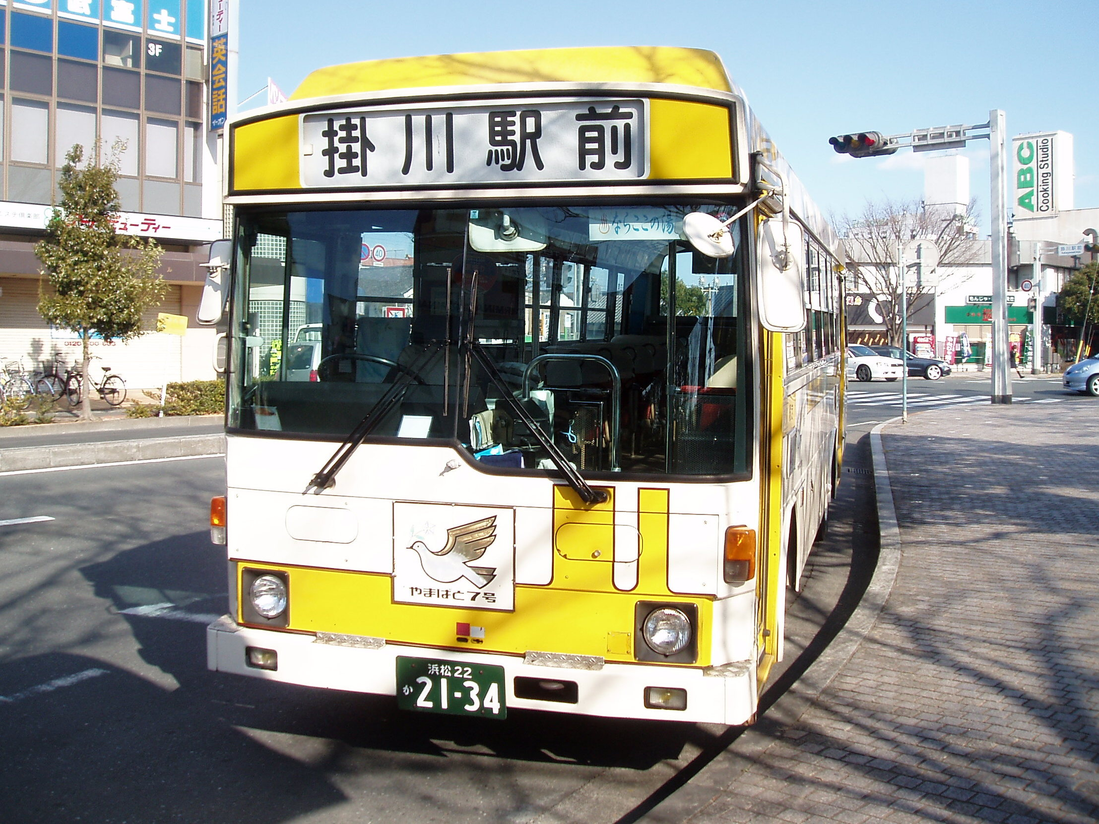 掛川バスサービスの車両